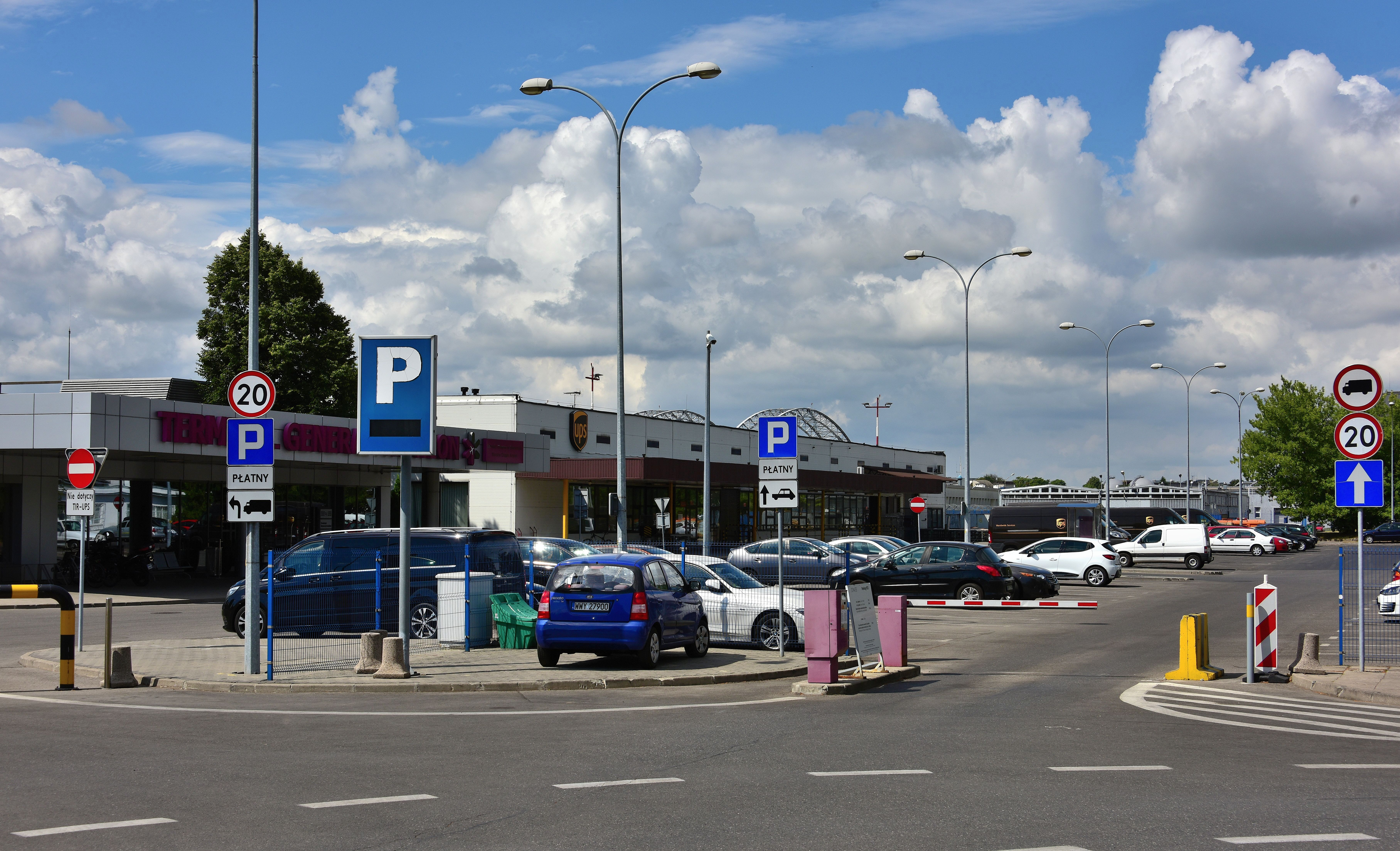 Lotnisko Chopina w Warszawie. Terminal General Aviation